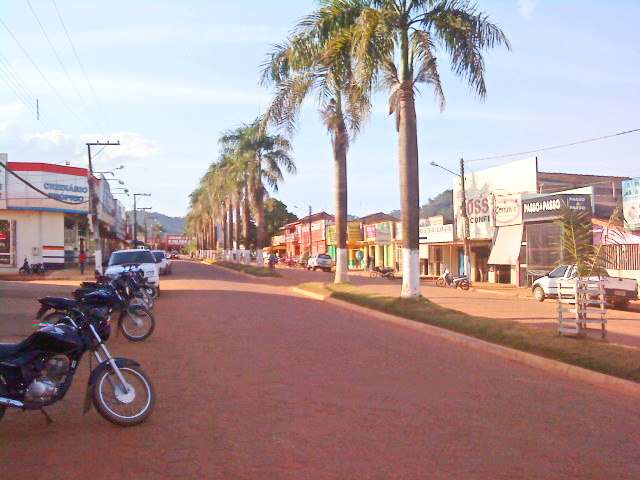 Avenida Pará no centro de Tucumã